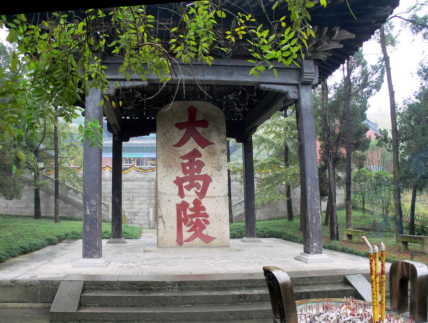 绍兴大禹陵